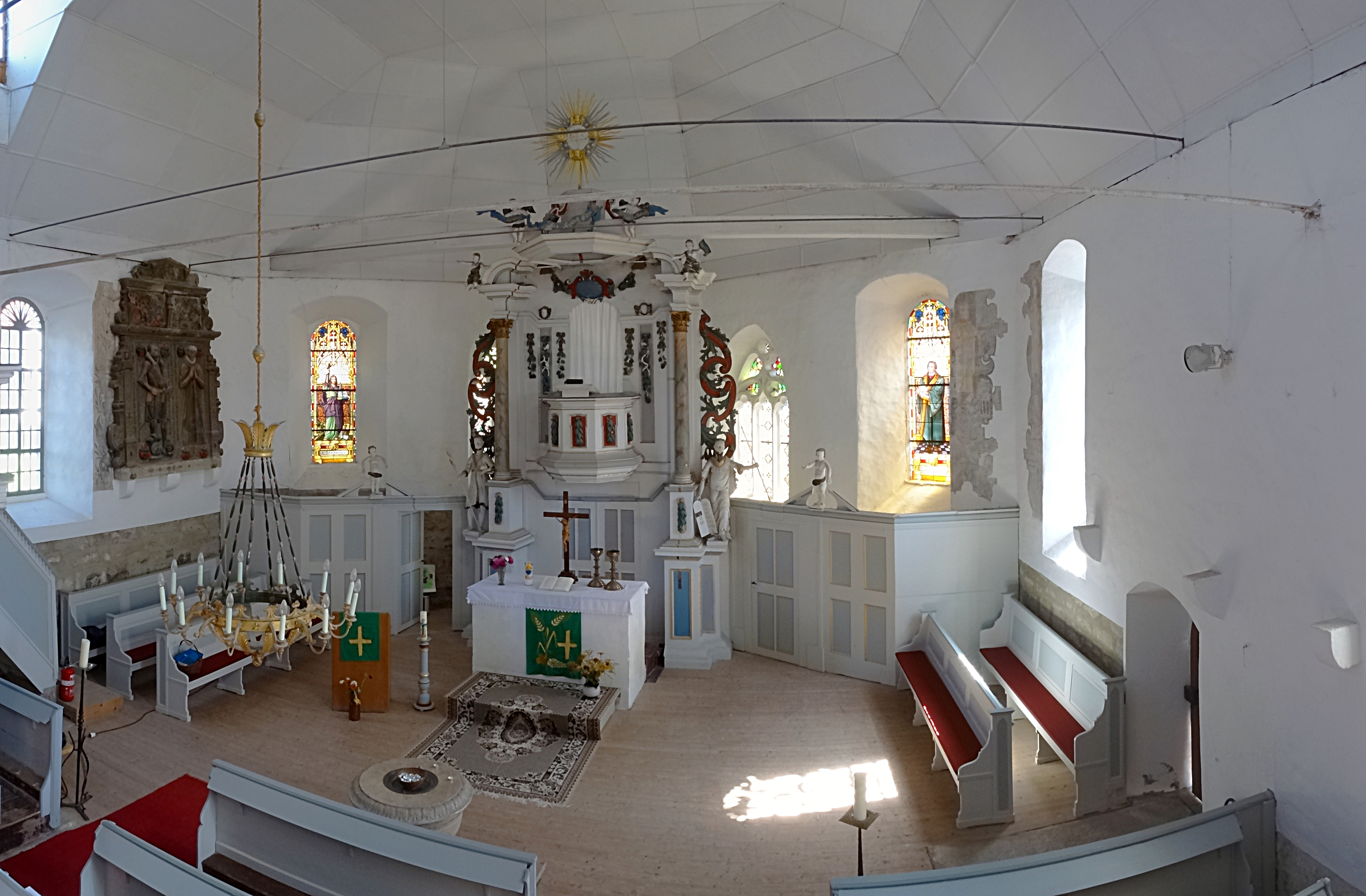 Altarraum in St. Bonifatius Kirchheilingen